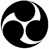 hidarimitsudomoe